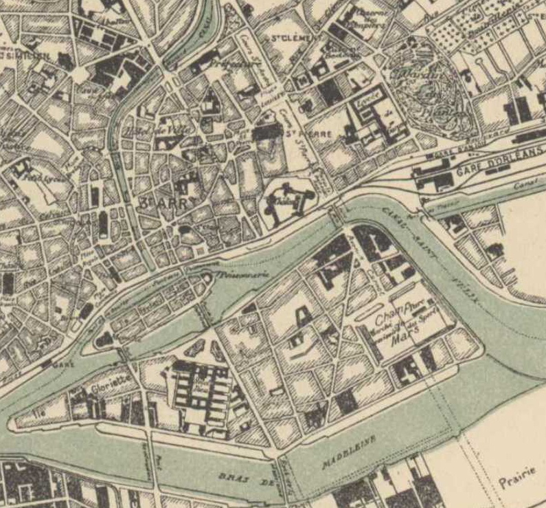 Plan de 1909. Revu et corrigé en 1921. Dressé sous l’administration de M. Guist’hau, maire, par L. Delattre, agent-voyer de la circonscription de Nantes, et E. Chevrier, agent technique principal (mairie de Nantes). C. Boite, photograveur, Nantes.